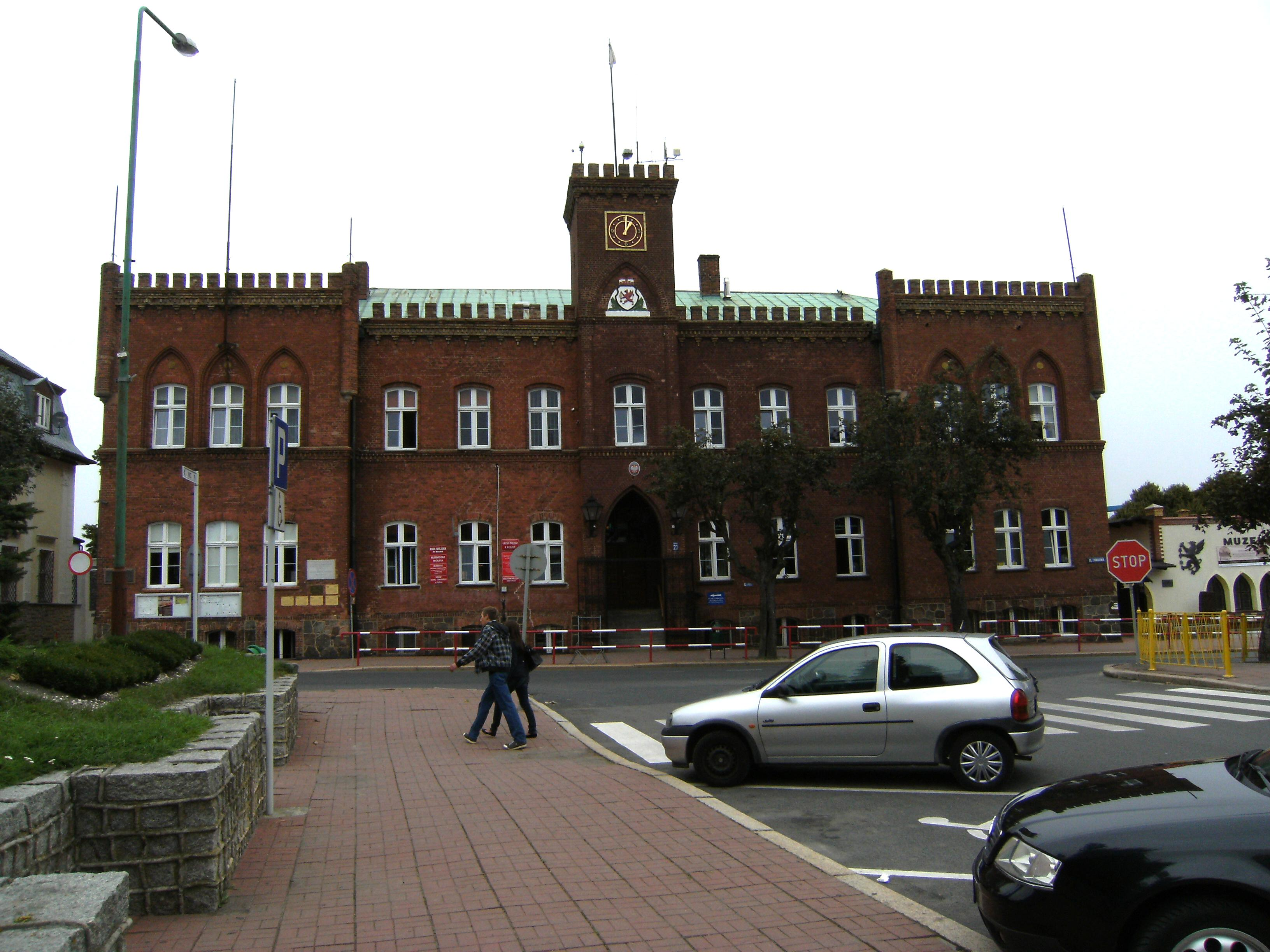 Rathaus Wolin